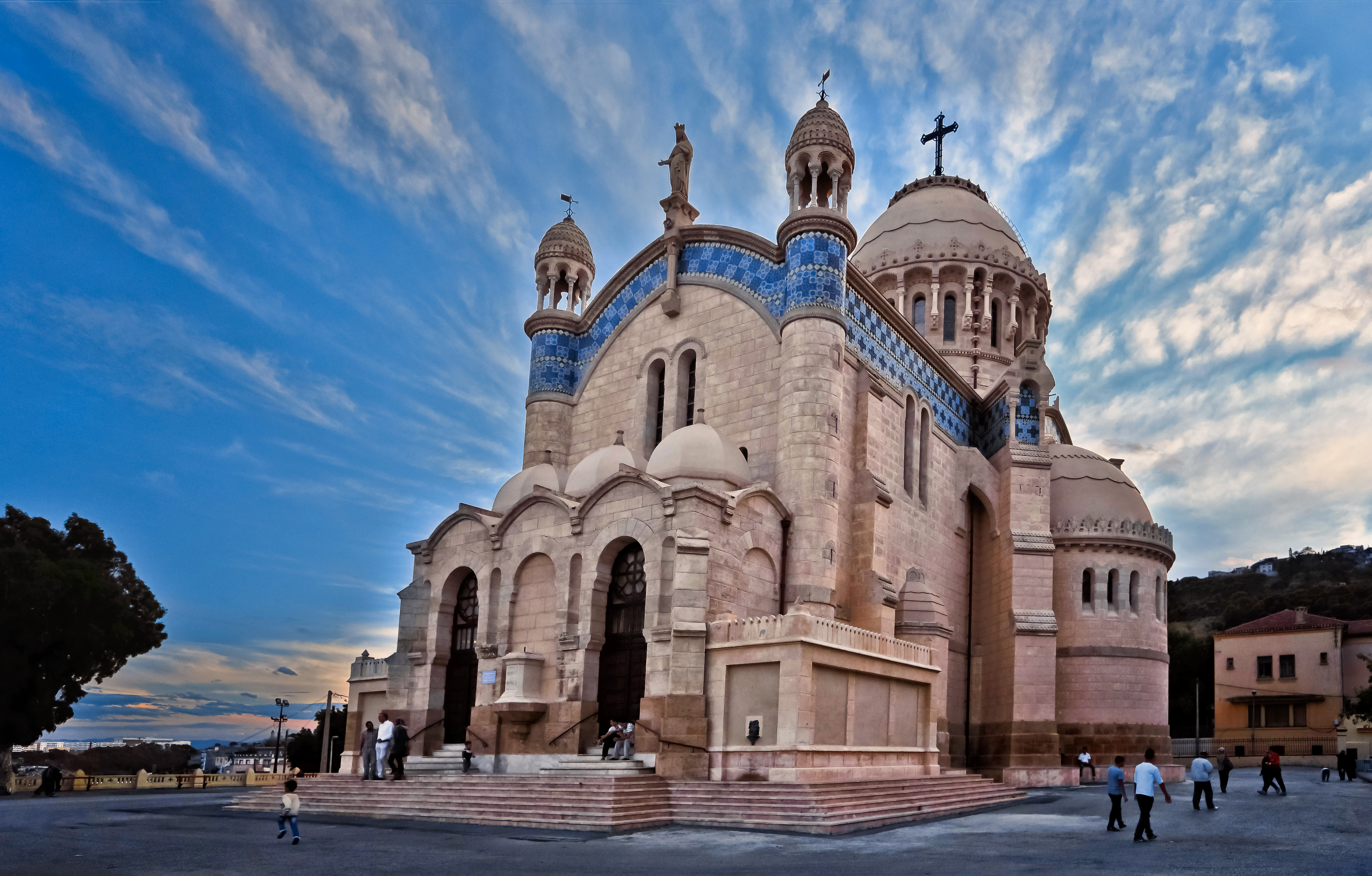 Notre Dame d'Afrique, aussi connue comme "Madame l'Afrique" ou encore "Lella Myriam" est située dans le quartier de Z'Ghara. Elle se dresse à 124 mètres d'altitude en hauteur sur les quartiers ouest d'Alger. La basilique fût achevée en 1872 après 14 ans de travaux, elle est l'oeuvre de l'architecte français Jean Eugène Fromageau. L'éxterieur est construit dans un style byzantin, quand à l'intérieur elle s'inspire de l'architecture hispano-mauresque.